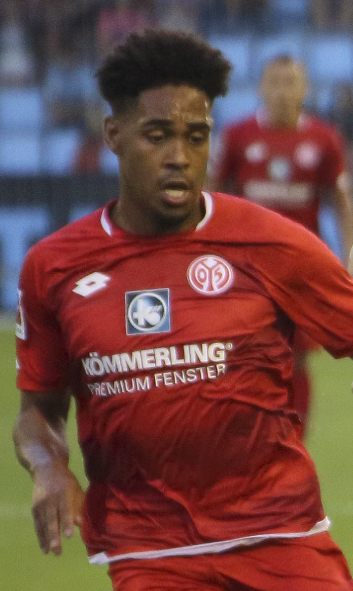 Partido disputado en los aledaños del Estadio de Balaidos, siendo el partido de presentación para el Celta ante su afición para la temporada 2018/2019